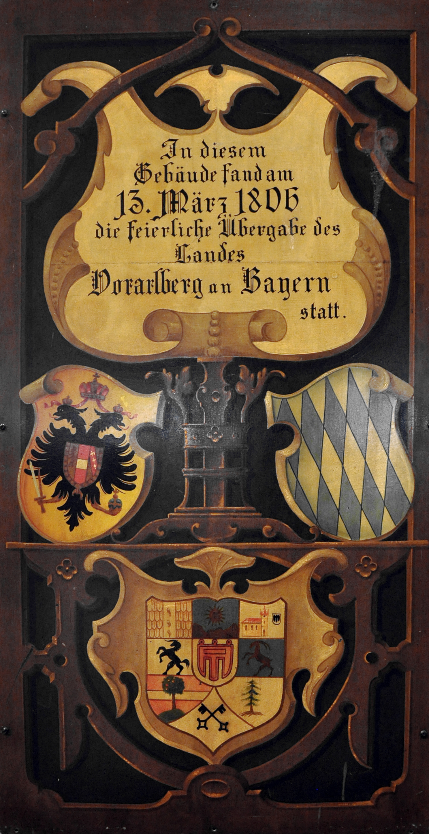 Tafel zum Gedenken an den Übergang Vorarlbergs an Bayern, Öl auf Eisenblech, nach 1863 (vielleicht zum Jubiläum 1906 oder zum Jubliäum des Aufstands von 1809 im Jahr 1909?) am "Gasthof zum Goldenen Löwen" (abgebrochen 1972) in Bregenz befestigt Bregenz, Vorarlberg Museum vorarlberg museum Native namevorarlberg museumLocationBregenz, Vorarlberg, AustriaCoordinates47° 30′ 16″ N, 9° 44′ 48″ E Established1857WebsiteVorarlberg Museum website